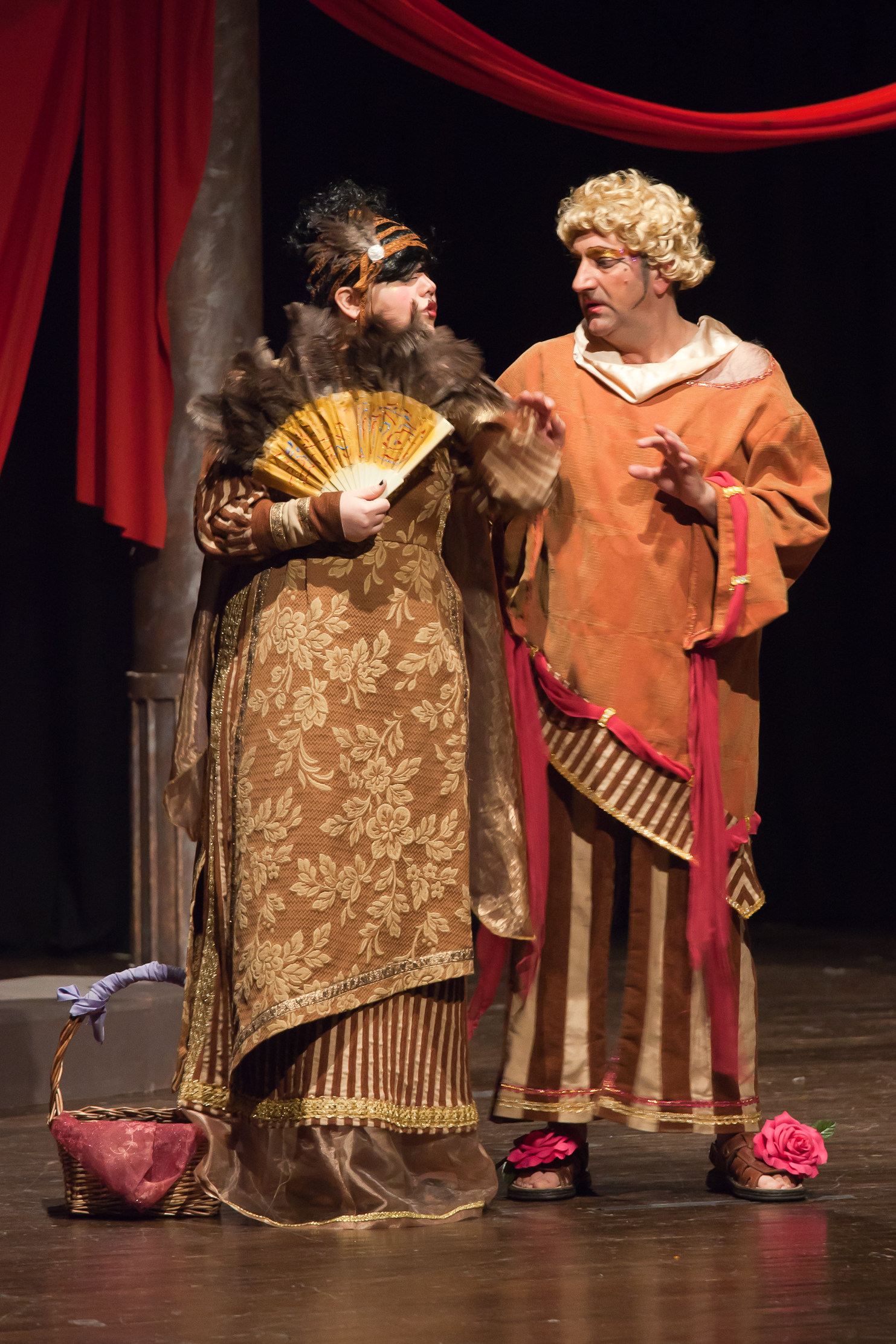 Festival de Lugo 2011 organizado por SEECGalicia. Grupo S.V. Producciones de Madrid, dirixido por Susana Verdú. © Dominio público sen restricións (Autor: Luis Miguel Bugallo Sánchez)